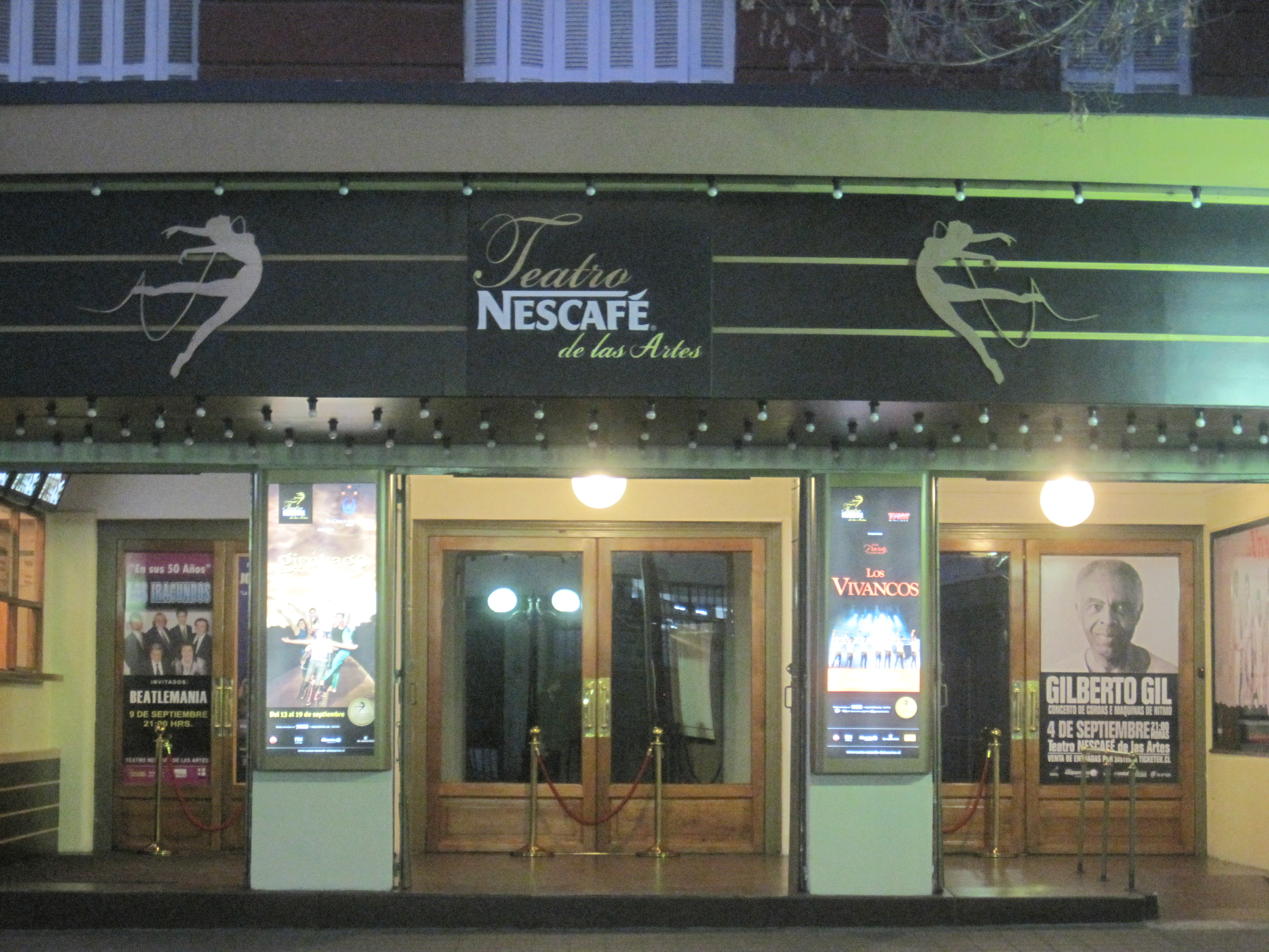 Nescafe Teatro